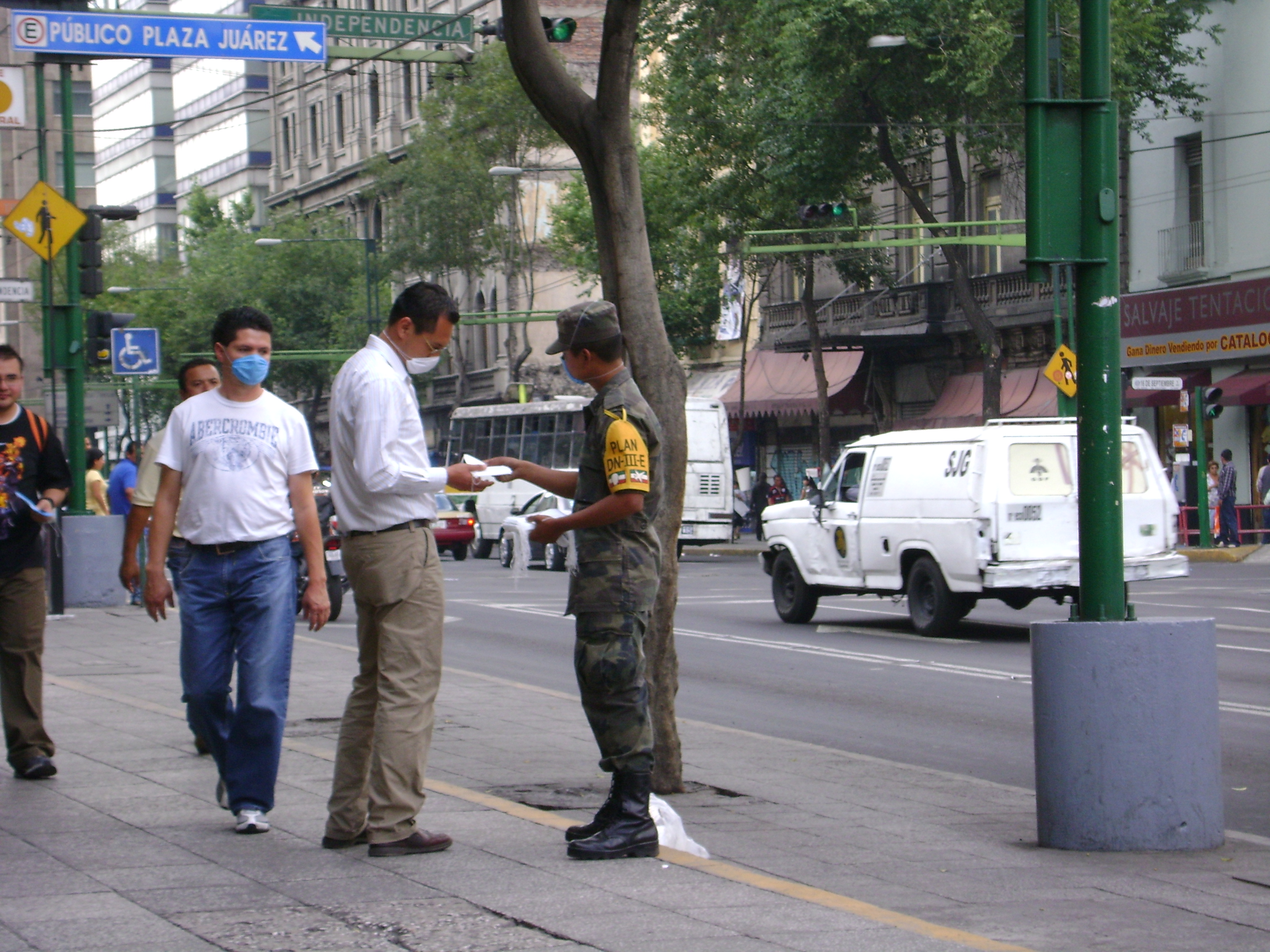 Soldado entregando cubre bocas a la población que lo requiera